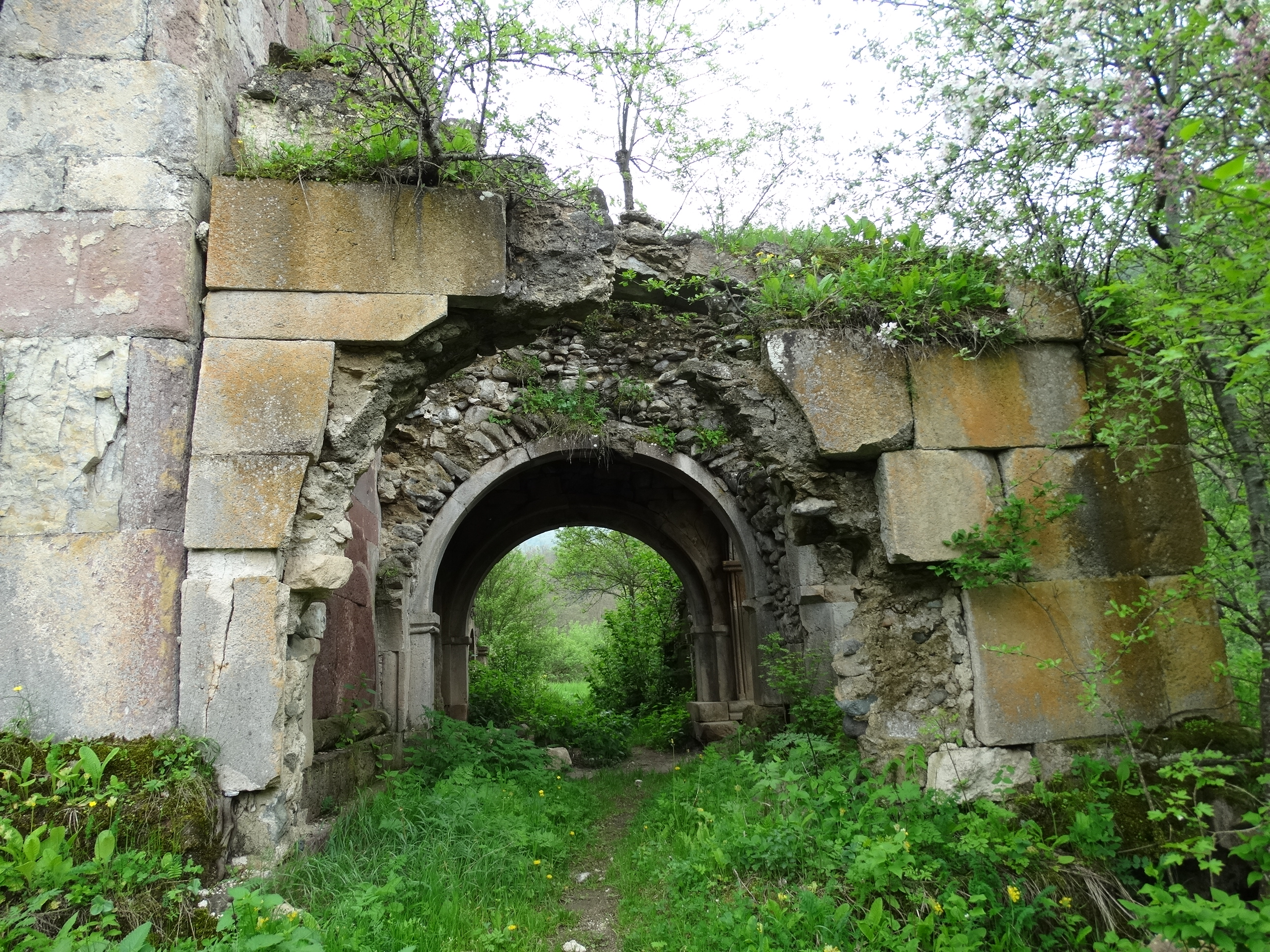 Խուճապի վանական համալիր - ՀՀ պատմամշակութային արգելոց-թանգարանների և պատմական միջավայրի պահպանության ծառայություն ՊՈԱԿ 92/6